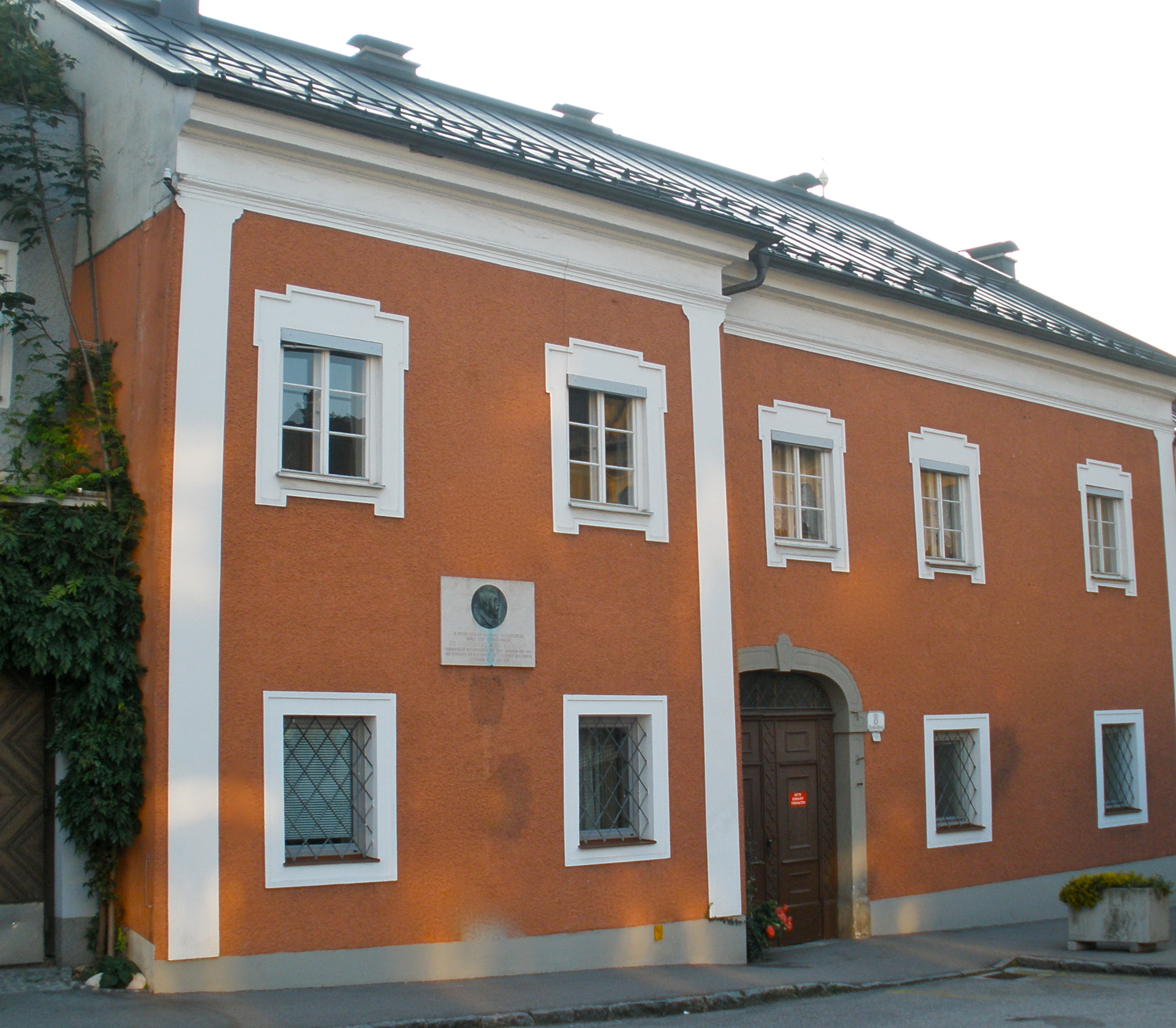 Das ehemalige Baderhaus befindet sich direkt neben dem Karmelitinnen-Kloster.